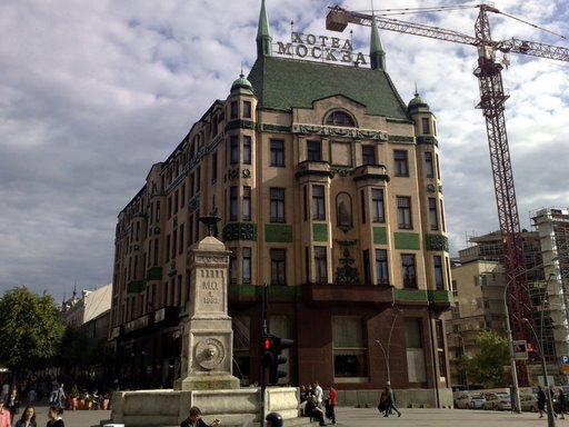 Hotel Moskva Belgrade